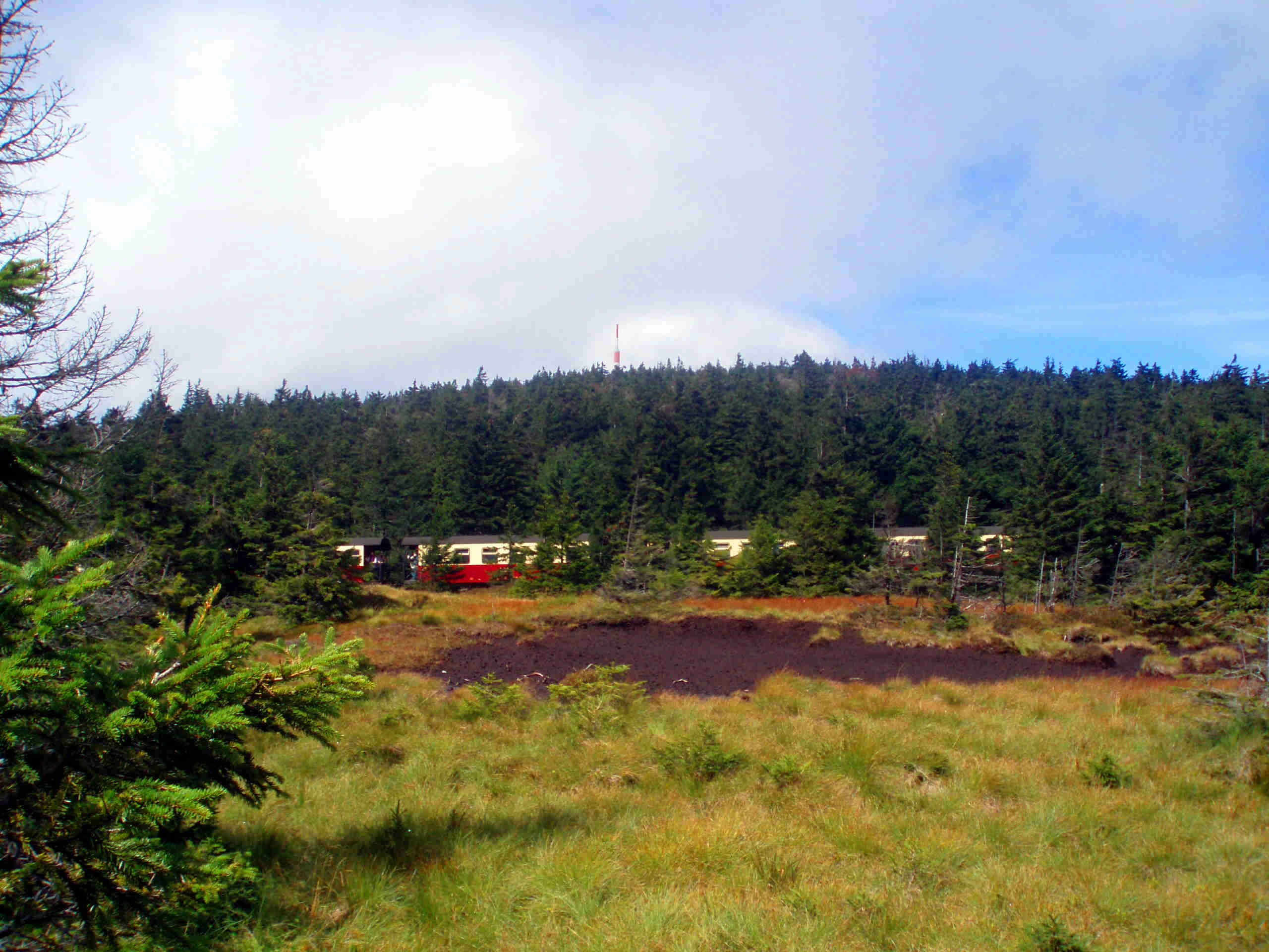 Blick über die Stelle des früheren Brockenteichs zum Brockengipfel